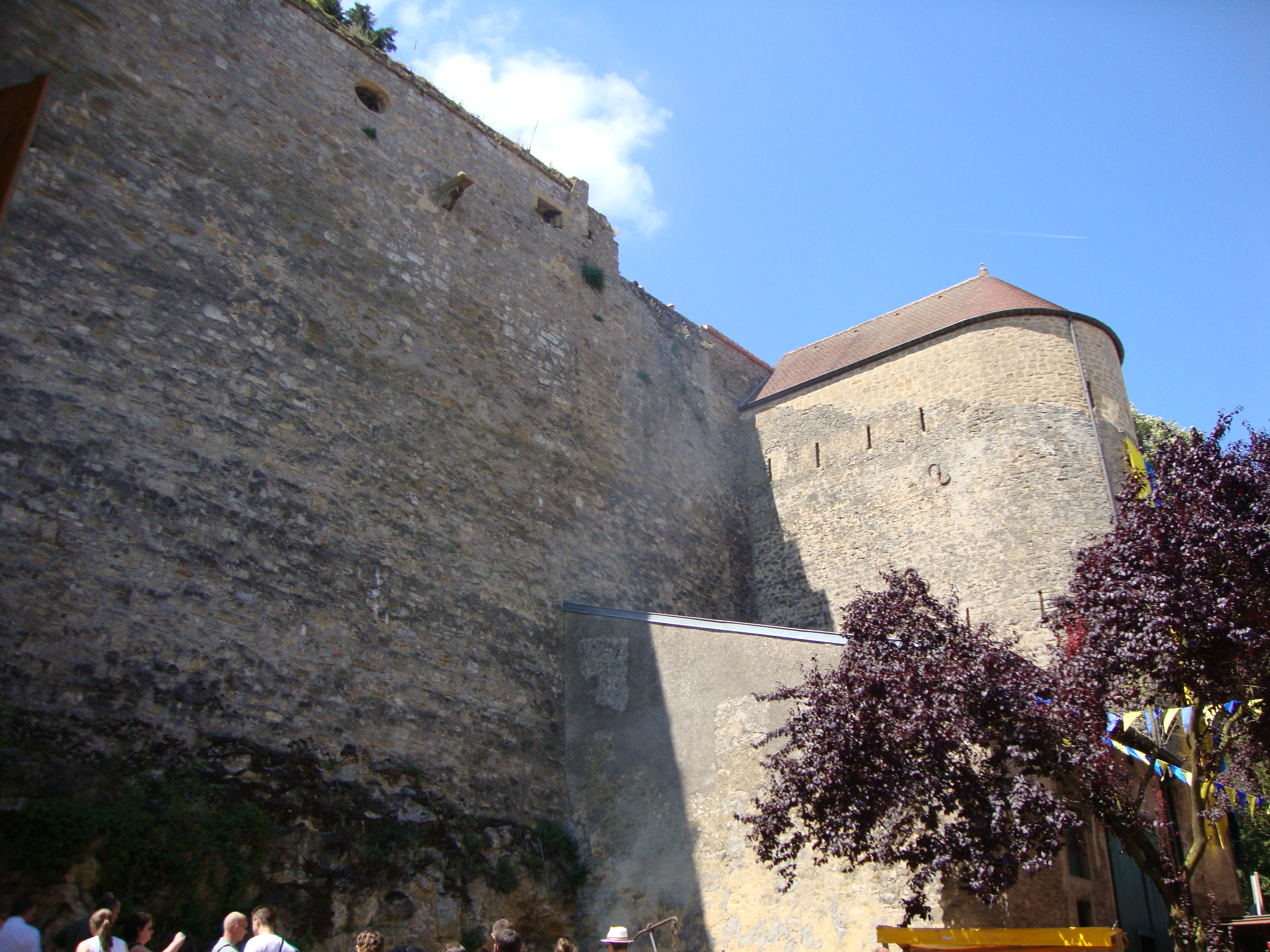 Rodemack (57)